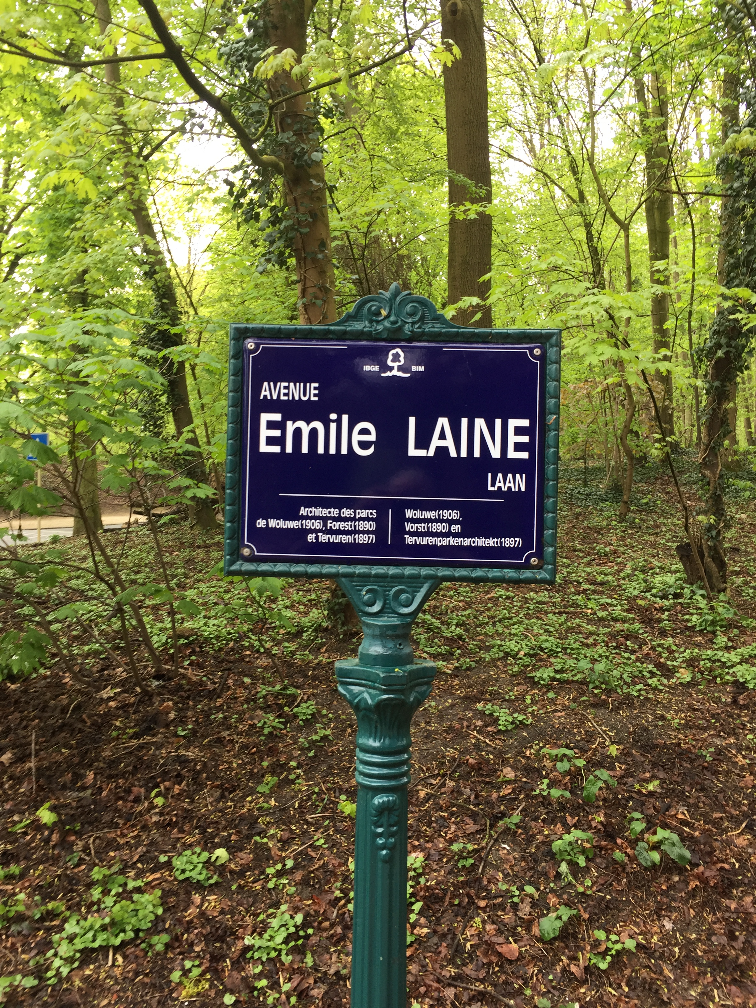 Emile Lainé